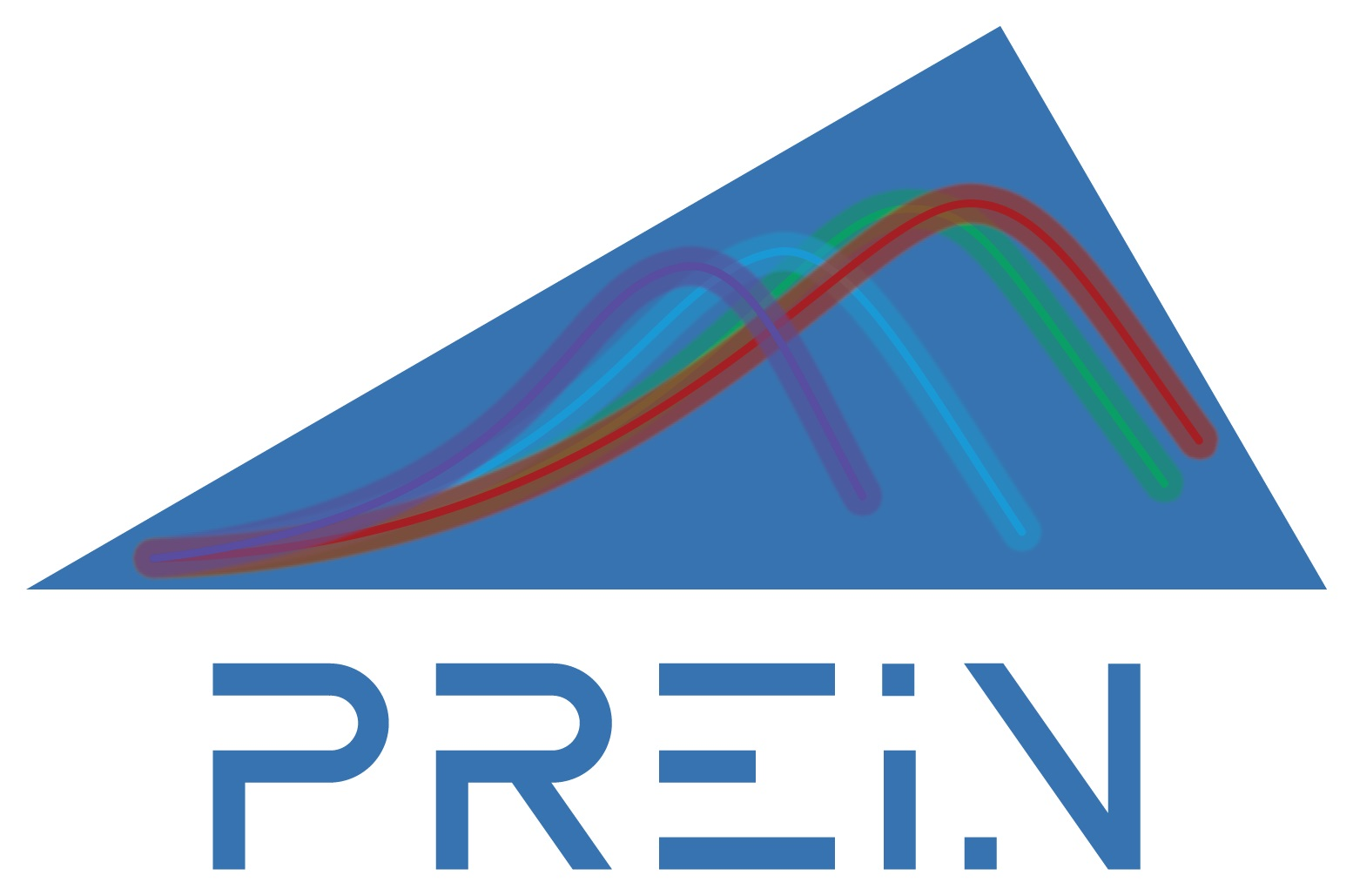 Fotoniikan lippulaivan (PREIN) logo